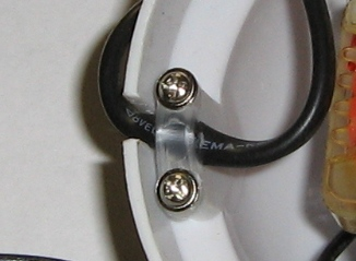 Zugentlastung